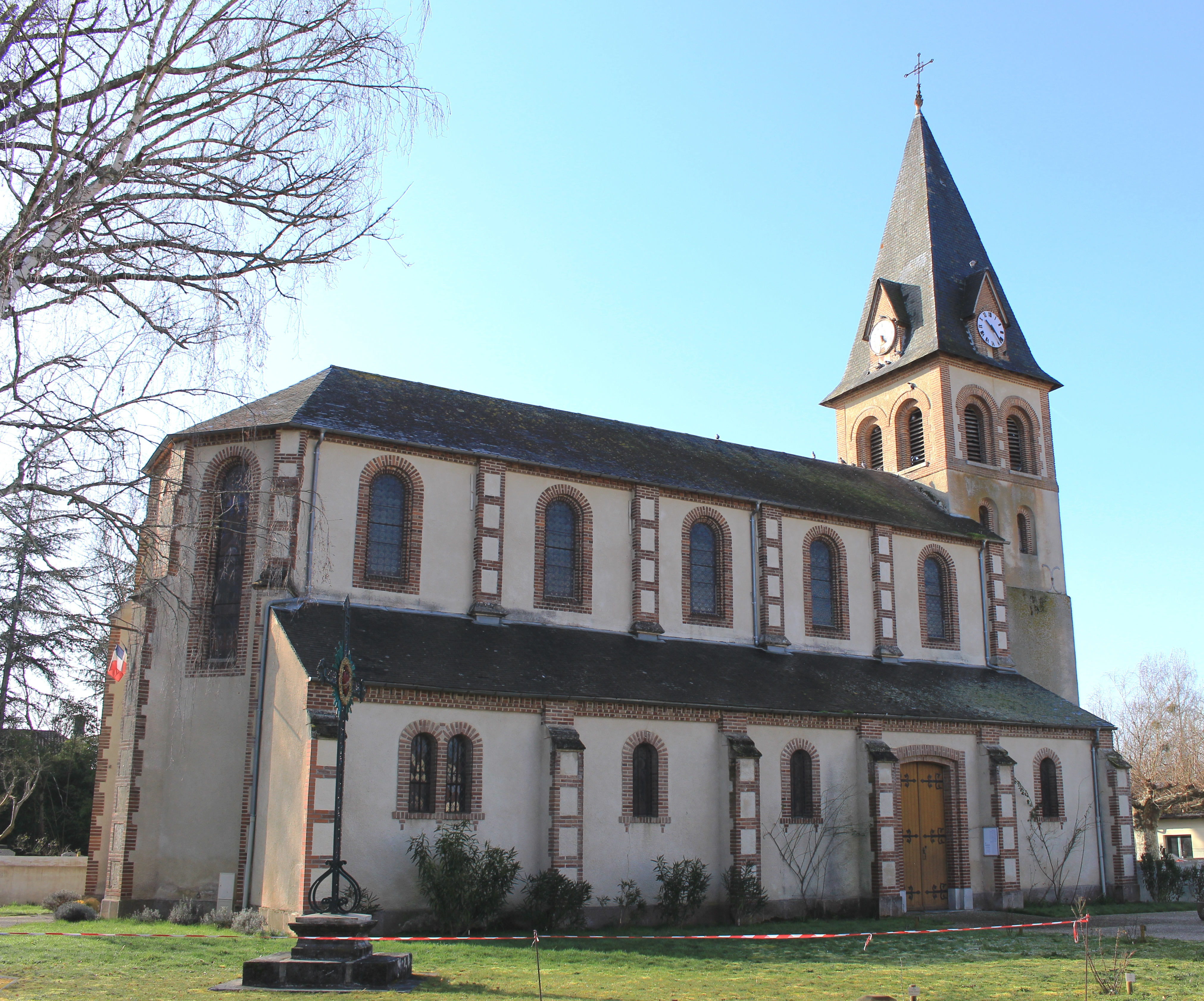 Eglise Saint-Martin de Chelle-Debat (Hautes-Pyrénées)